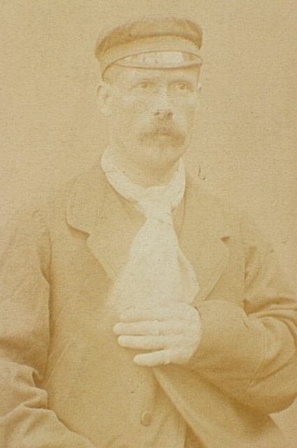 Jacques Louis Durand (1817-1871)